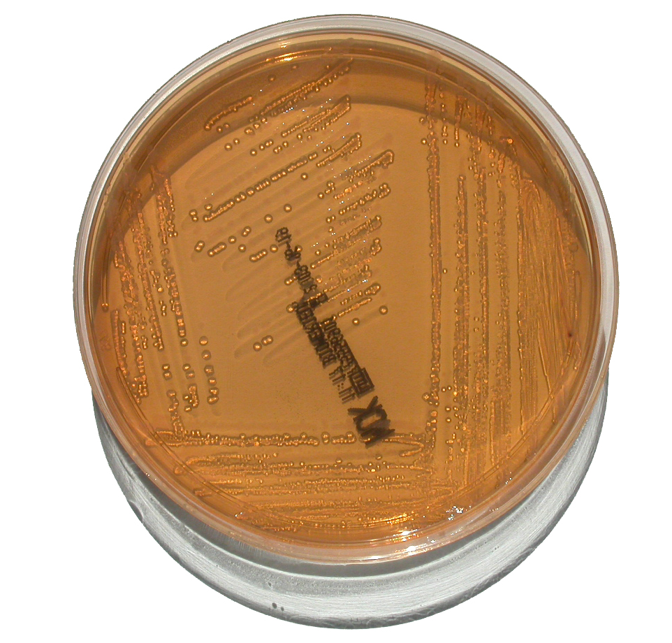 Souche de P.mirabilis sur milieu de Mac Conkey (image personnelle) Philippinjl 5 juin 2003